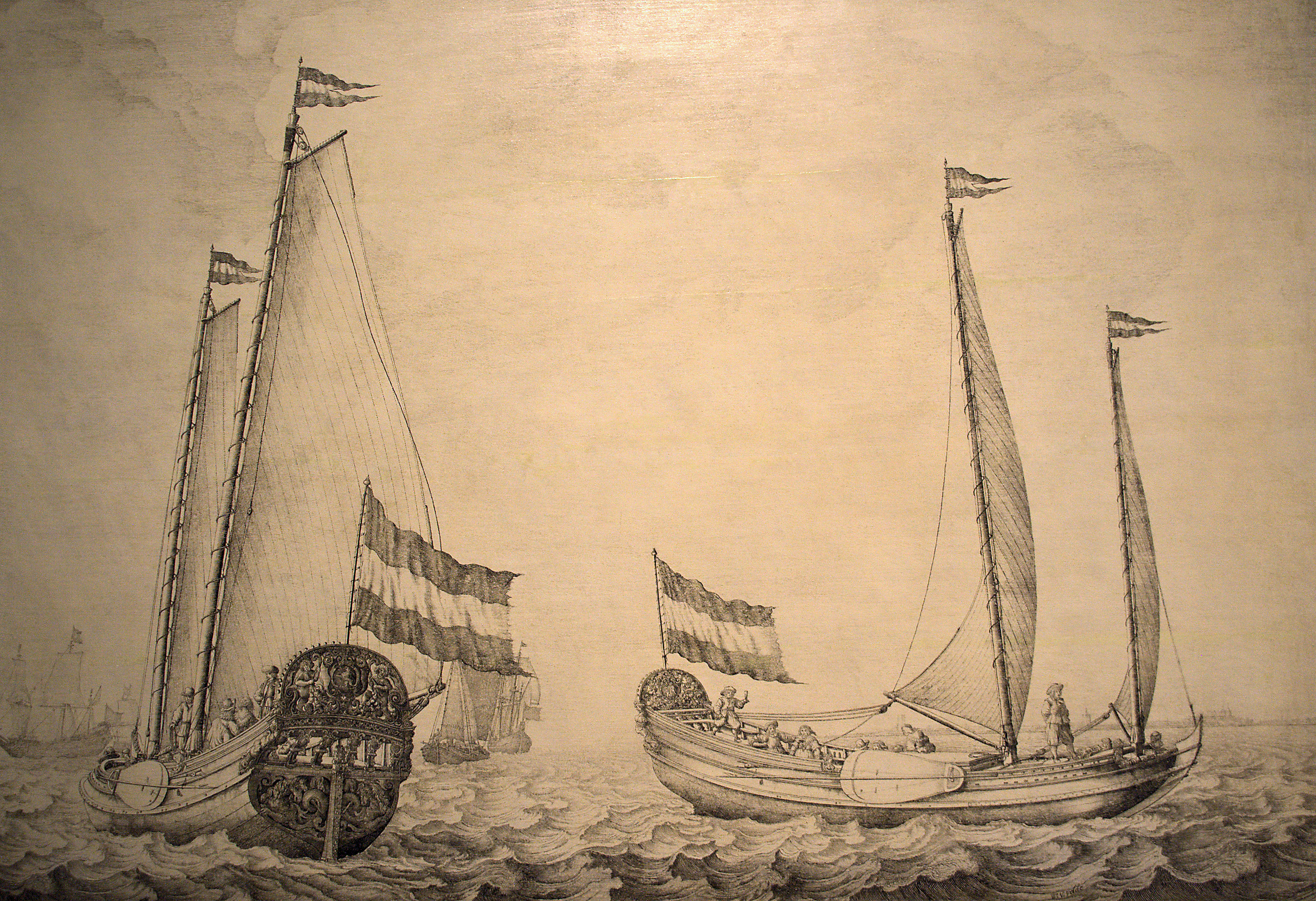 ’t Speeljacht (Willem v.d. Velde) Maritiem Museum - ’t Speeljacht (Willem v.d. Velde)